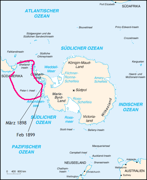 Graphik zur Darstellung der Expedition